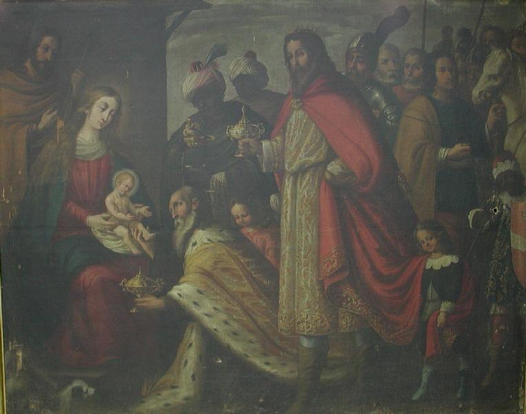 La obra representa el momento en que el Niño Jesús fue adorado por los Reyes magos.